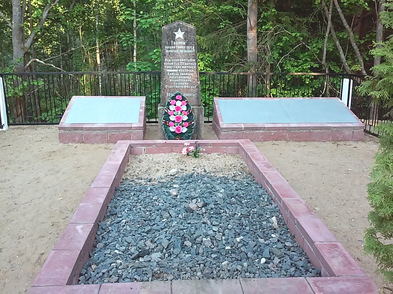 Памятник евреям деревни Камень Лепельского района, убитым нацистами 17 сентября 1941 года. Находится примерно в полукилометре севернее деревни, после кладбища, слева от дороги в урочище Борки